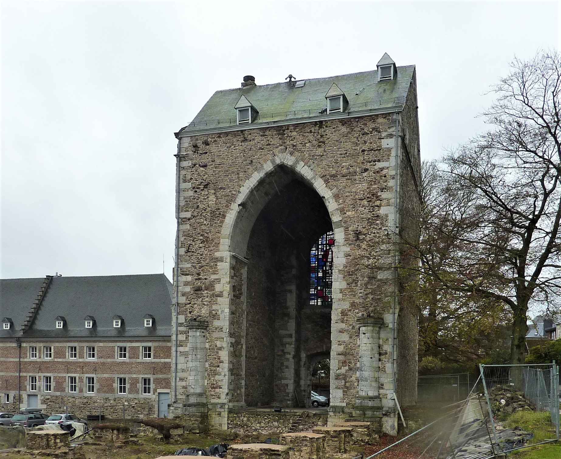 Abbaye de Stavelot